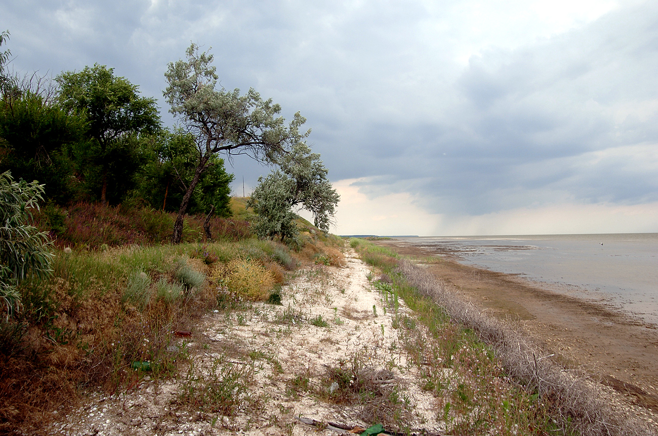 Берег Молочного лимана между сёлами Косых и Лиманское, Акимовский район Запорожской области